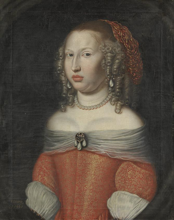 Henrietta Dorothea, geb. Landgräfin von Hessen- Darmstadt, Tochter von Landgraf Georg II., Gräfin von Waldeck-Pyrmont (1641-1672)